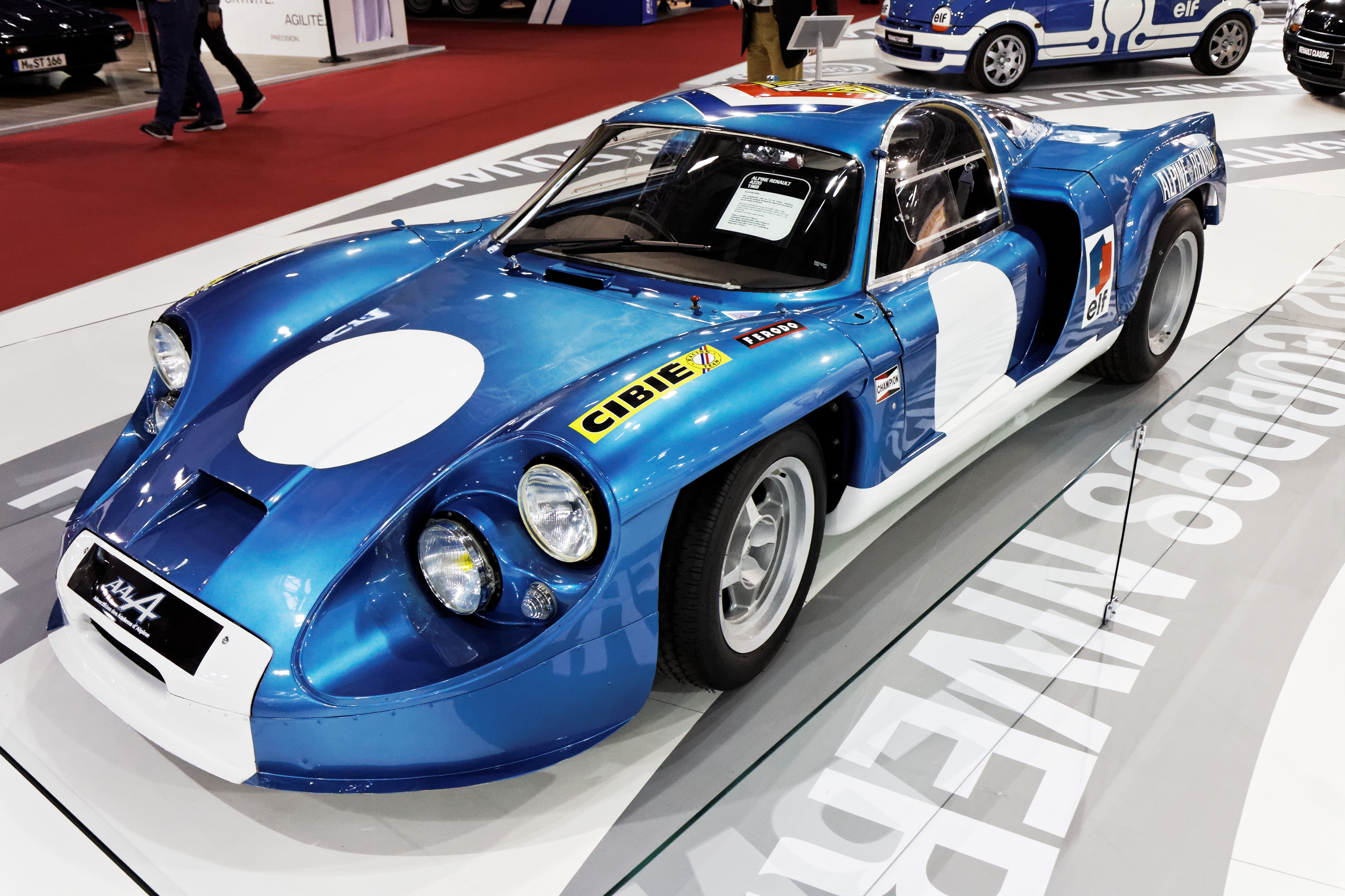 Une Alpine Renault A220 présentée lors du salon retromobile 2013.